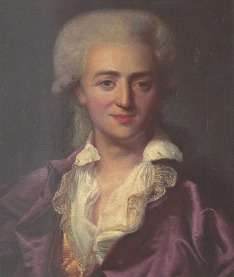 Jean-Barthélémy Le Couteulx de Canteleu (?)